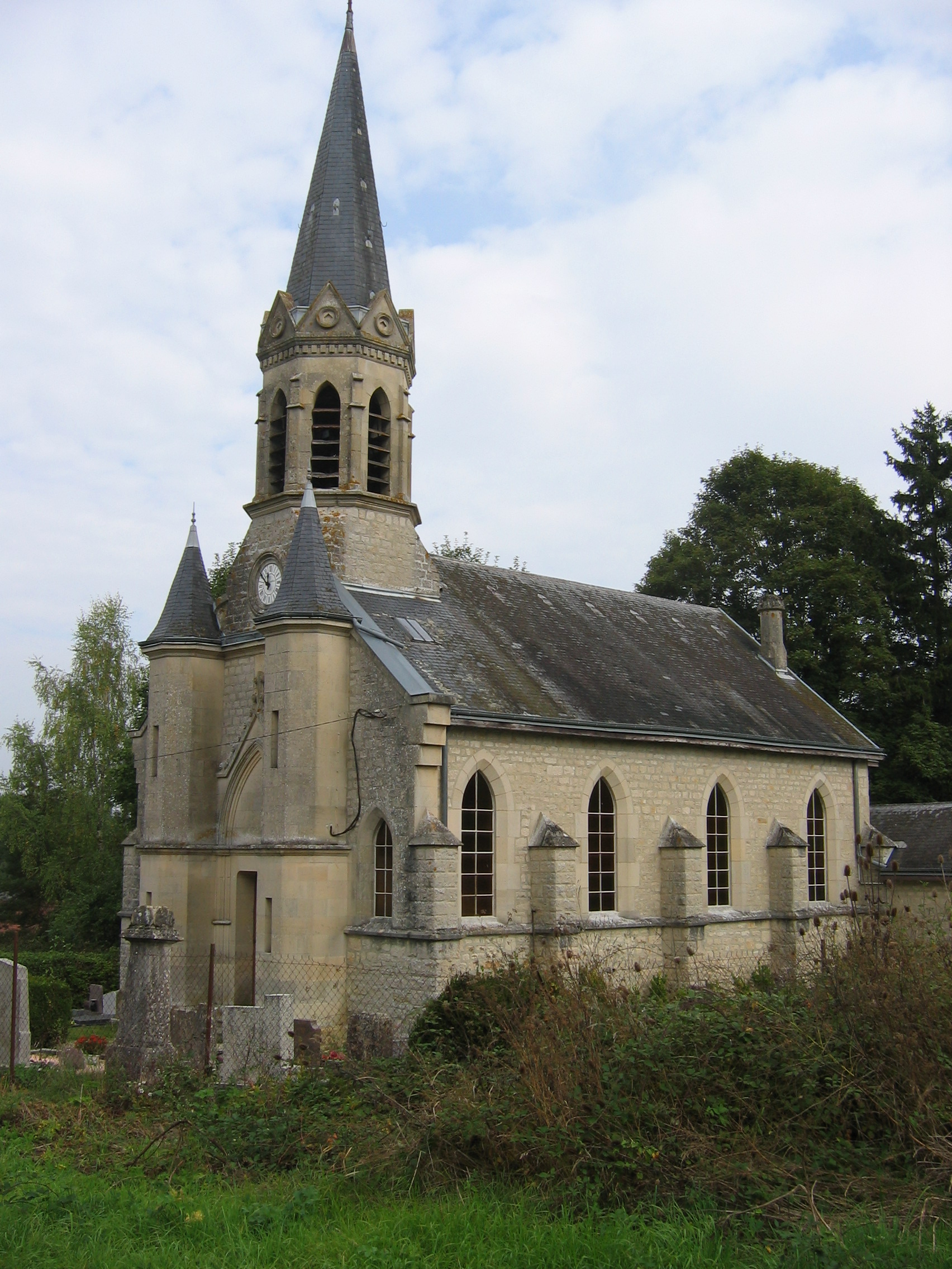 église, village de Lançon, Ardennes, France